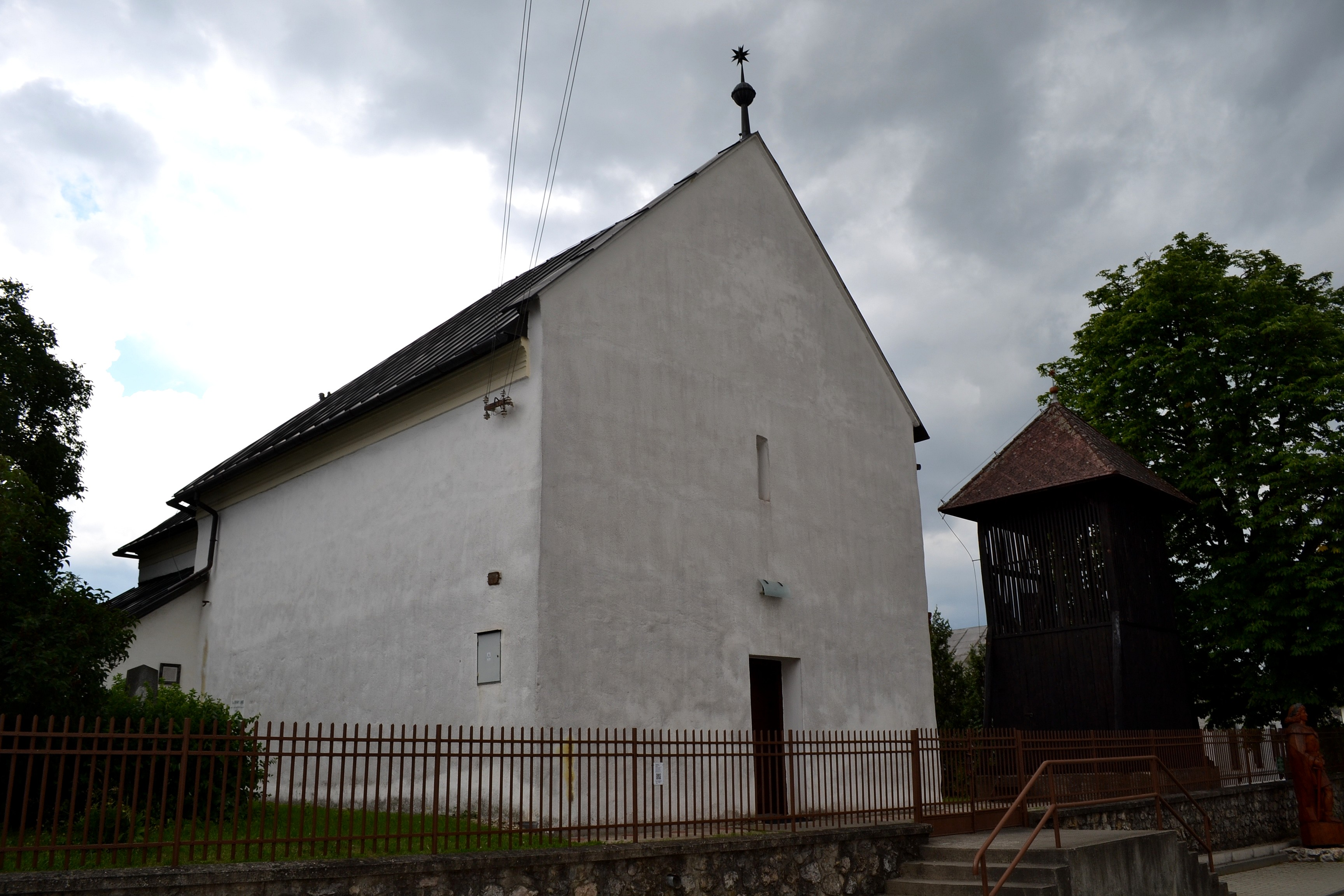 Čečejovce (okr. Košice-okolie), kostol Refomovanej kresťanskej cirkvi